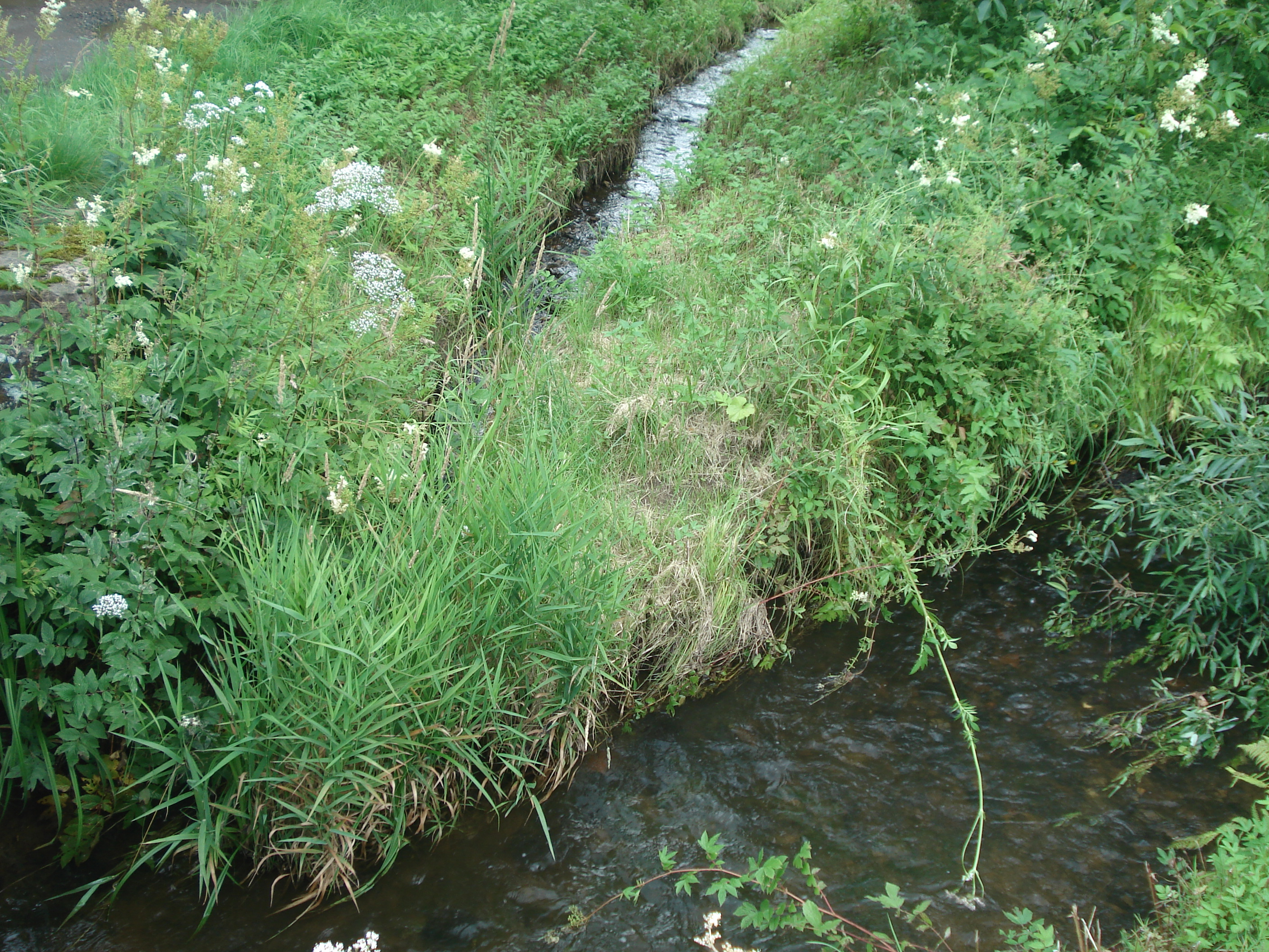 Der Büchelbach (hinten) mündet in die Bieber (von rechts nach vorne)